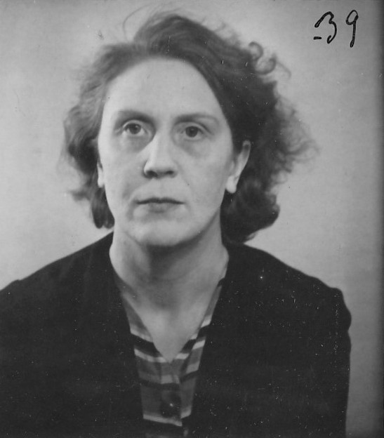 Tekijänoikeudellisesti vapaa valokuva vuodelta 1939